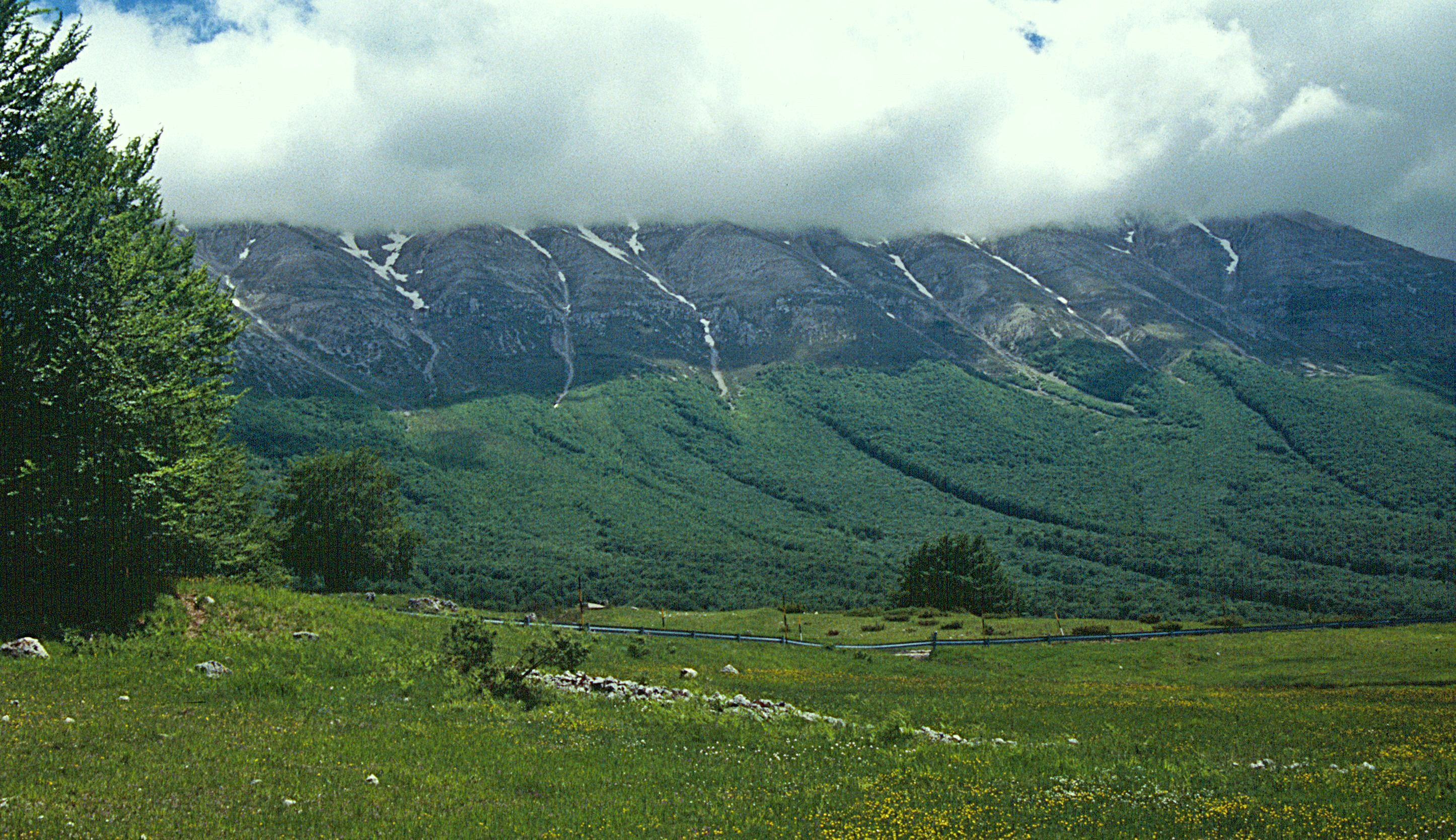 Majella-Naturpark: Passo San Leonardo